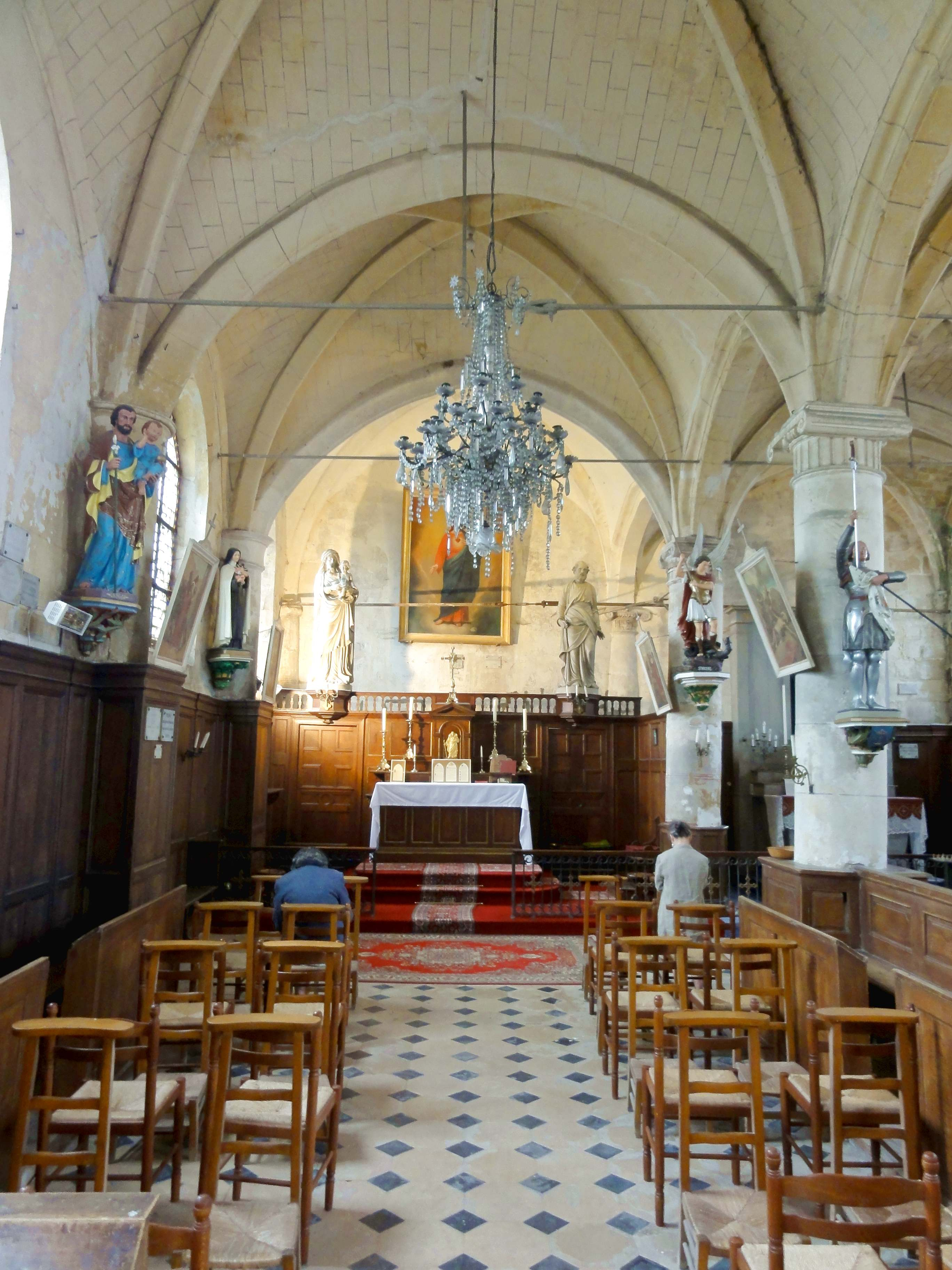 Intérieur de l'église (voir titre).